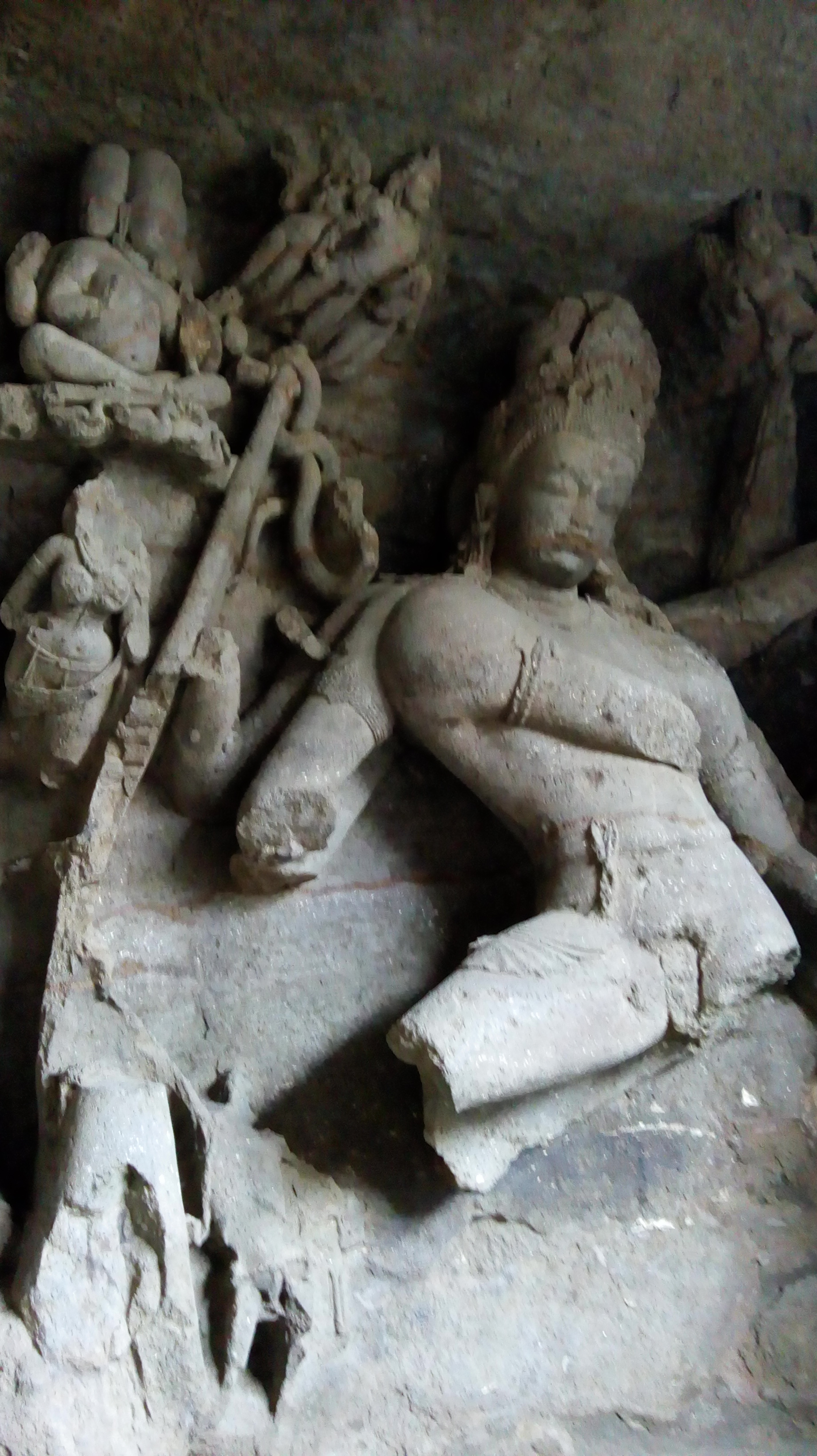 लेणी -गुहा क्रमांक १